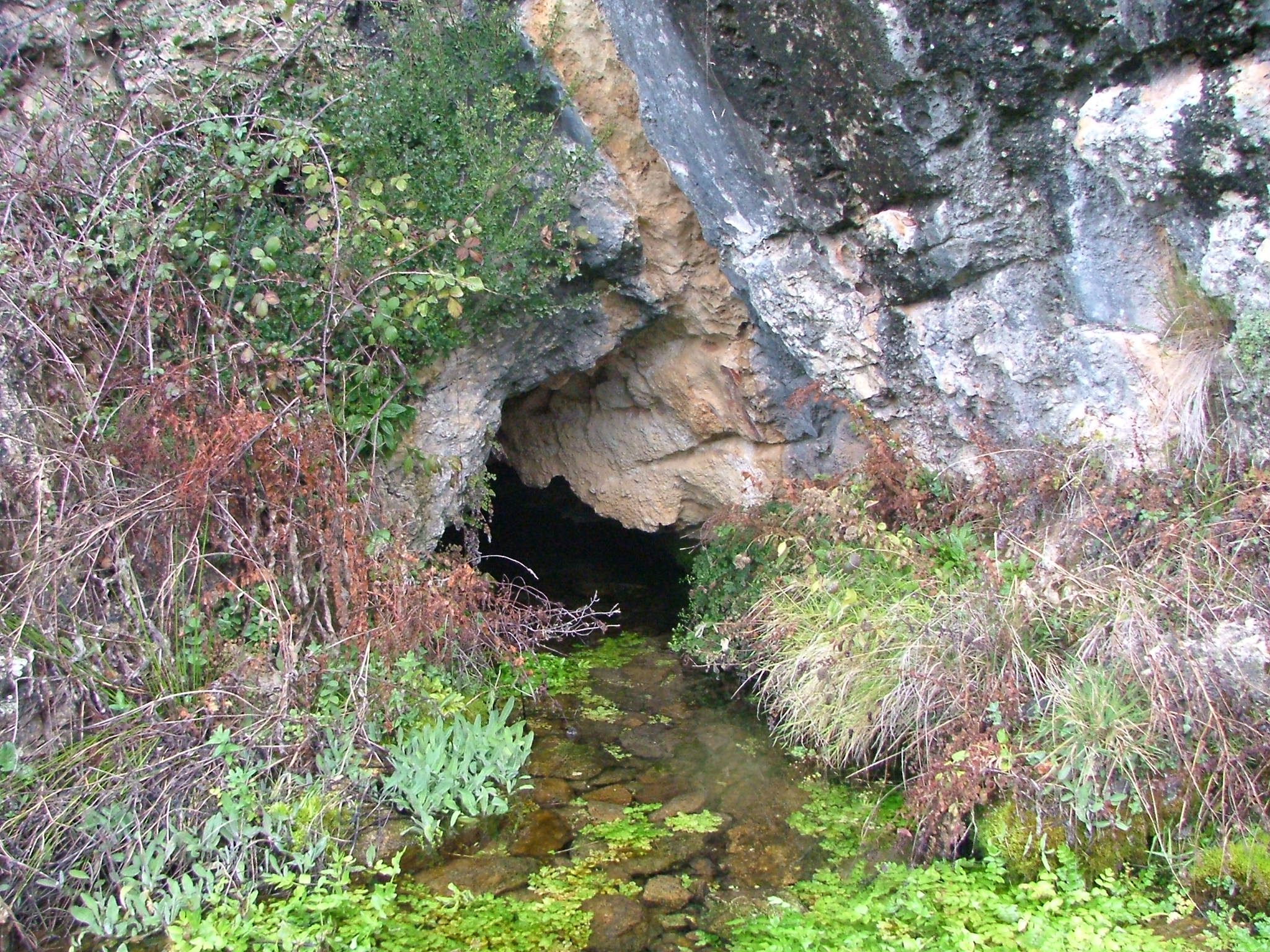 Boca de entra a la Cueva del Agua- La Toba (Santiago-Pontones)- Jaén_Sierra de Segura